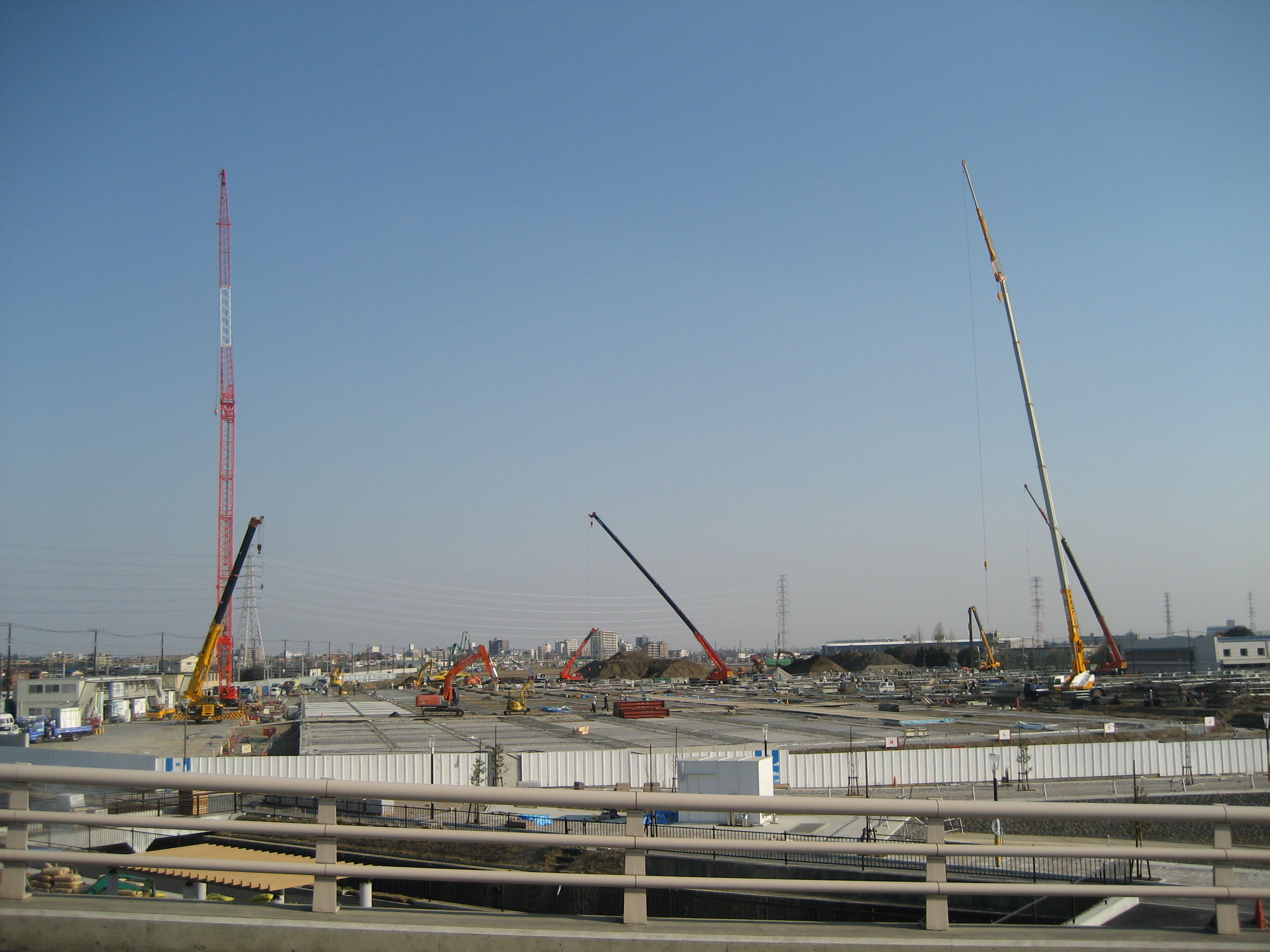 再開発中の武蔵野操車場跡地